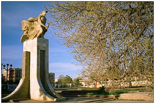 Statue en face de la Wilaya de Bouira